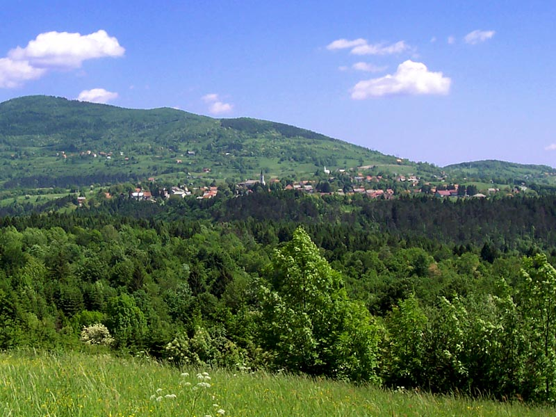 Panorama Vrbosvskog